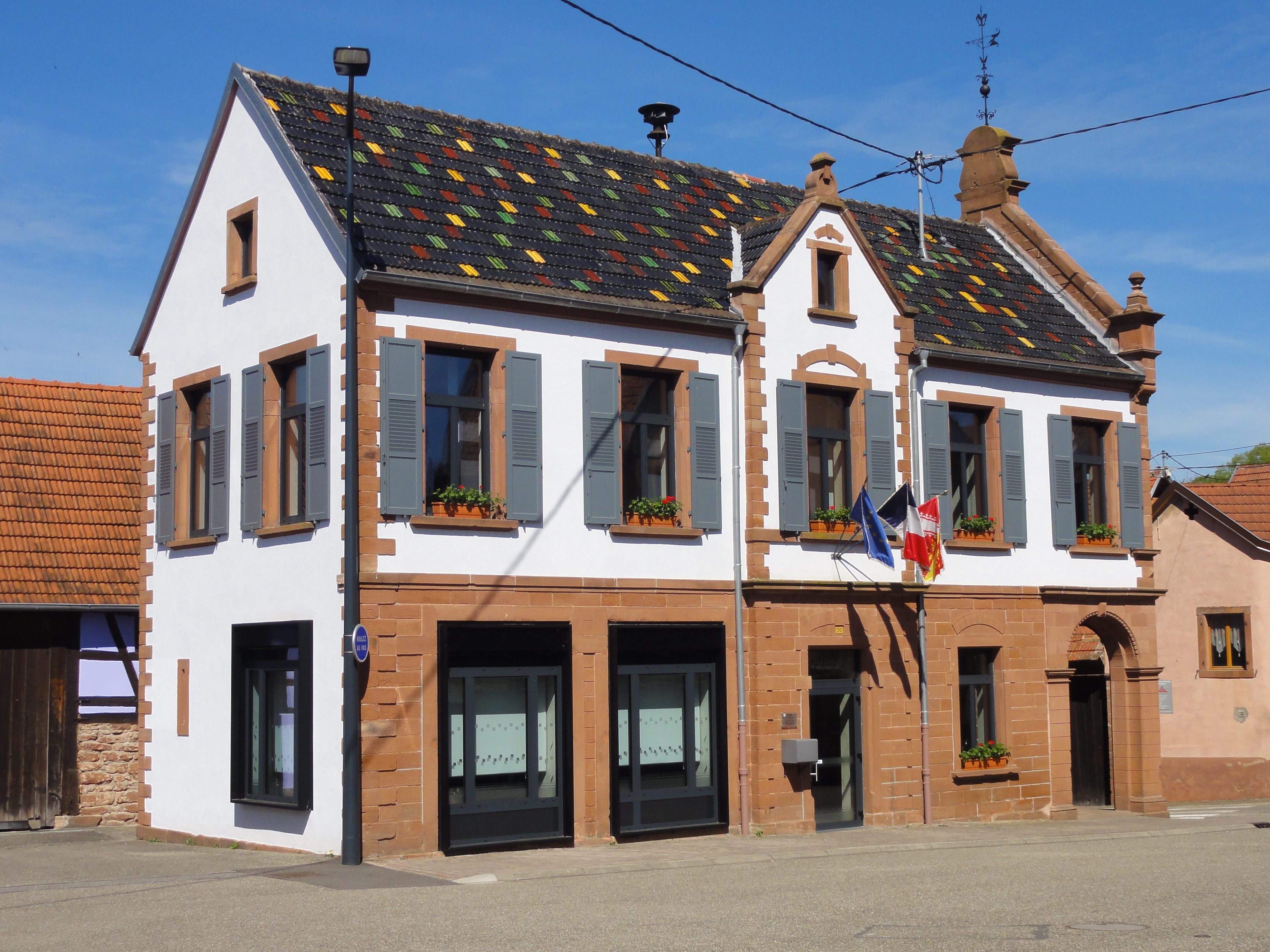 Alsace, Bas-Rhin, Obersoultzbach, Mairie (1897), 20 rue Principale. .